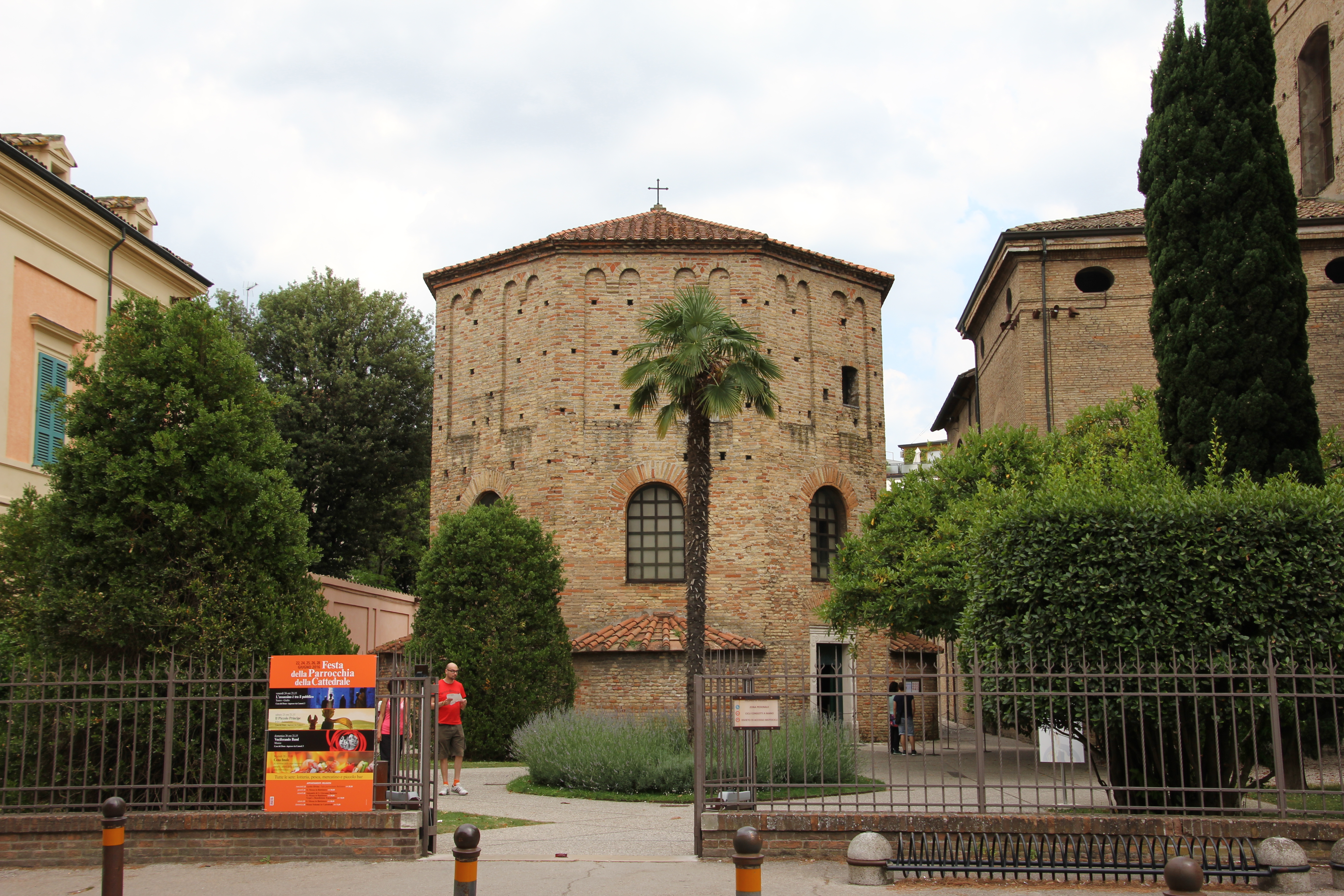 Ravenna, battistero Neoniano